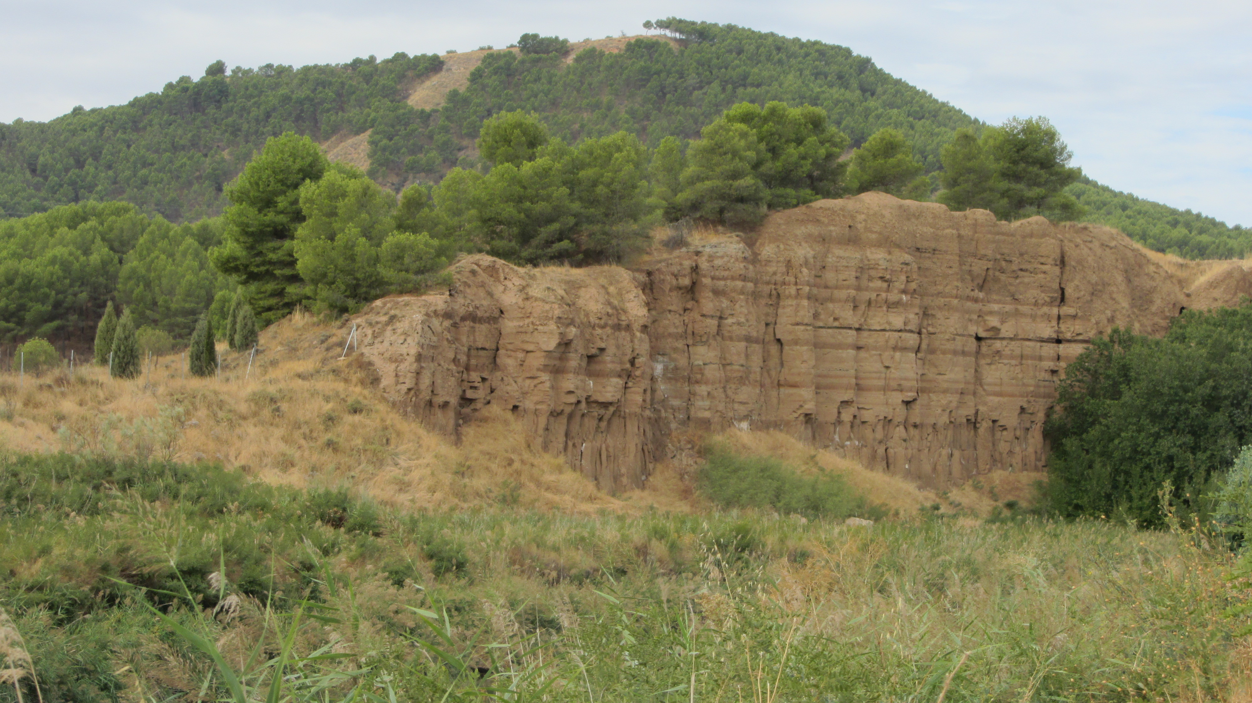 Rivera del Henares, a su paso por Alcalá de Henares (Comunidad de Madrid - España) con el cerro San Juan del Viso al fondo. This is a photography of a Special Area of Conservation in Spain with the ID: ES3110001. Natura2000 entry, EEA entry